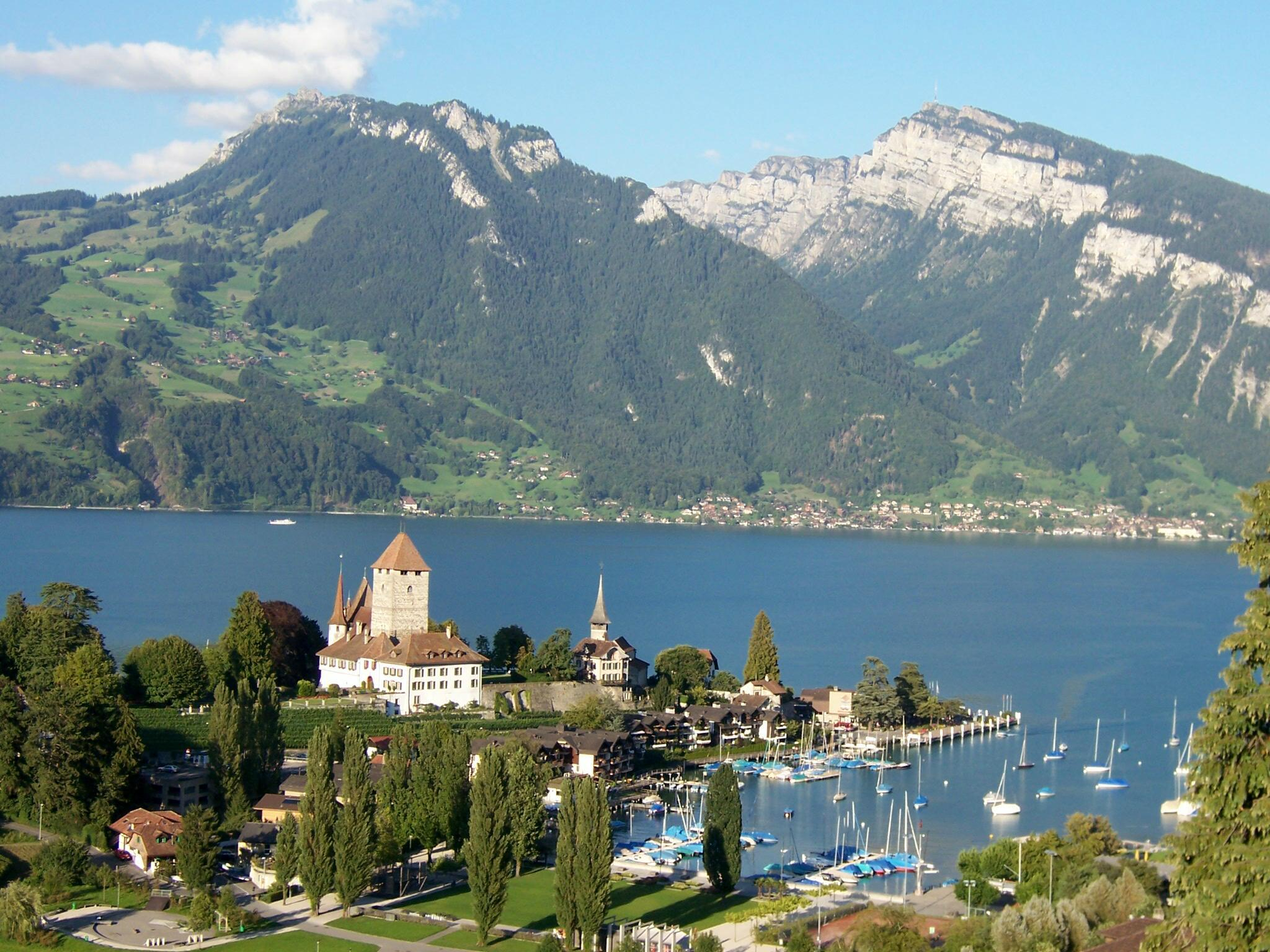 Spiez am Thunersee mit Schloss und Schlosskirche (Kanton Bern, Schweiz)